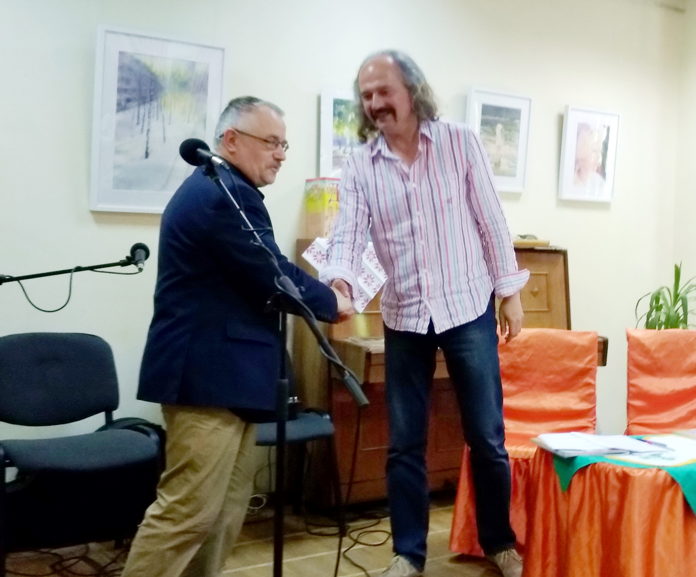 Прэзентацыя кнігі «Дзіцячы атлас Беларусі. Замкі, крэпасці, бажніцы». Бібліятэка ім. Цёткі, Мінск. Віншаванні аўтару кнігі Ярашу Малішэўскаму ад галоўнага рэдактара выд. «Мастацкая літаратура» Віктара Шніпа